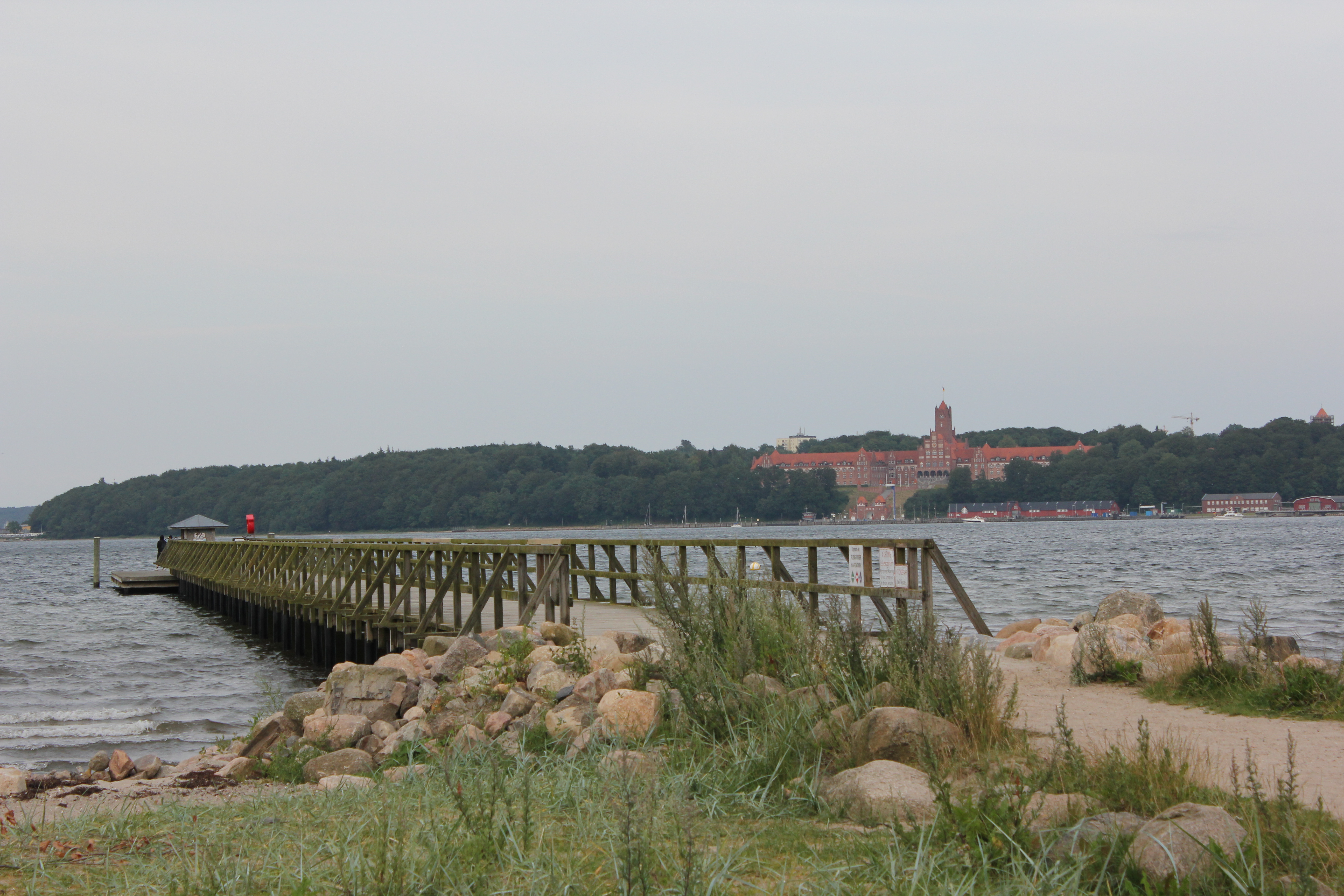 Ostseebad-Brücke mit Marine-Burg im Hintergrund (Flensburg), Bild 01